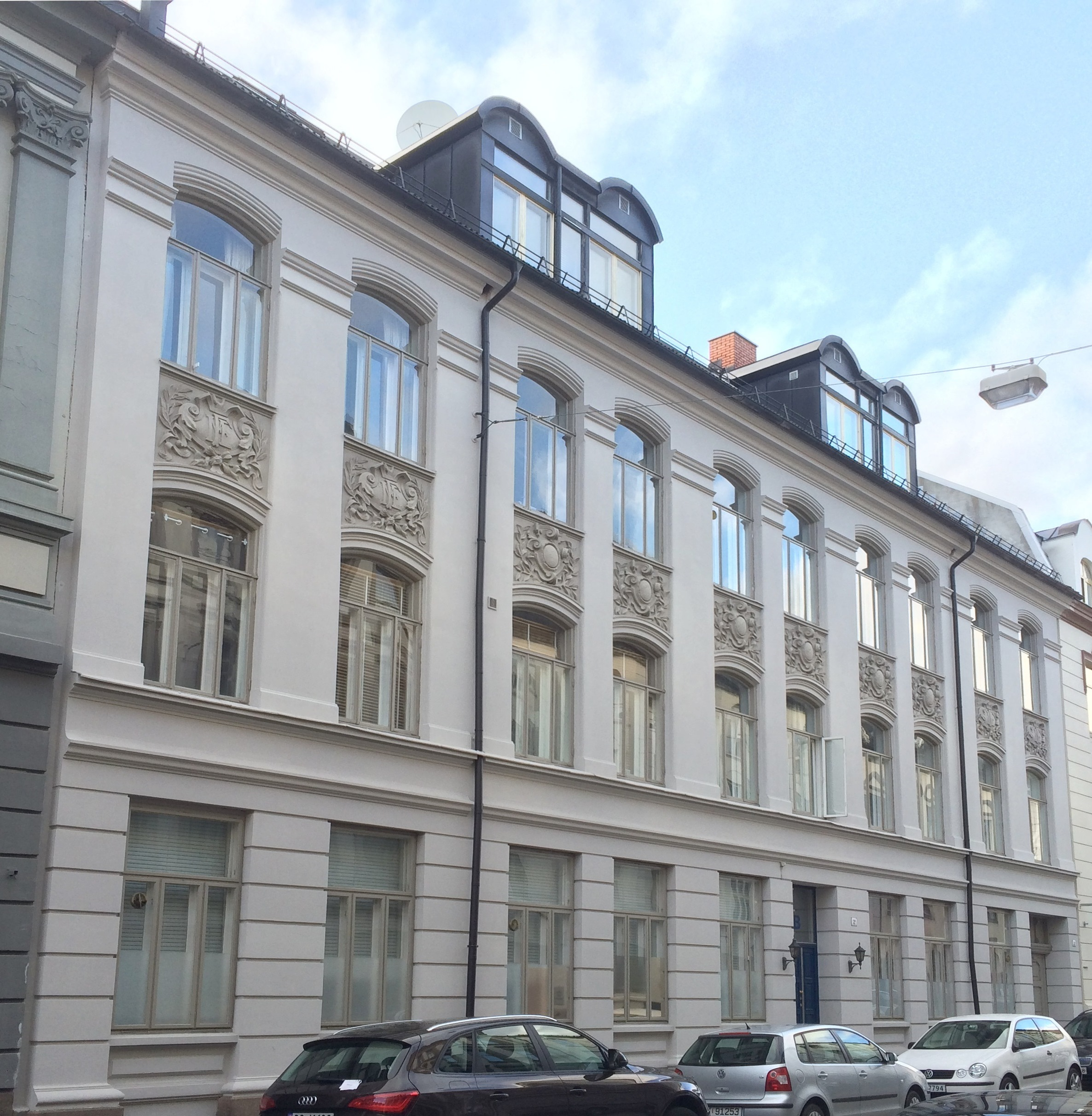 Haxthausens gate 2B. Arkitekt: Marius Leyell (1899).